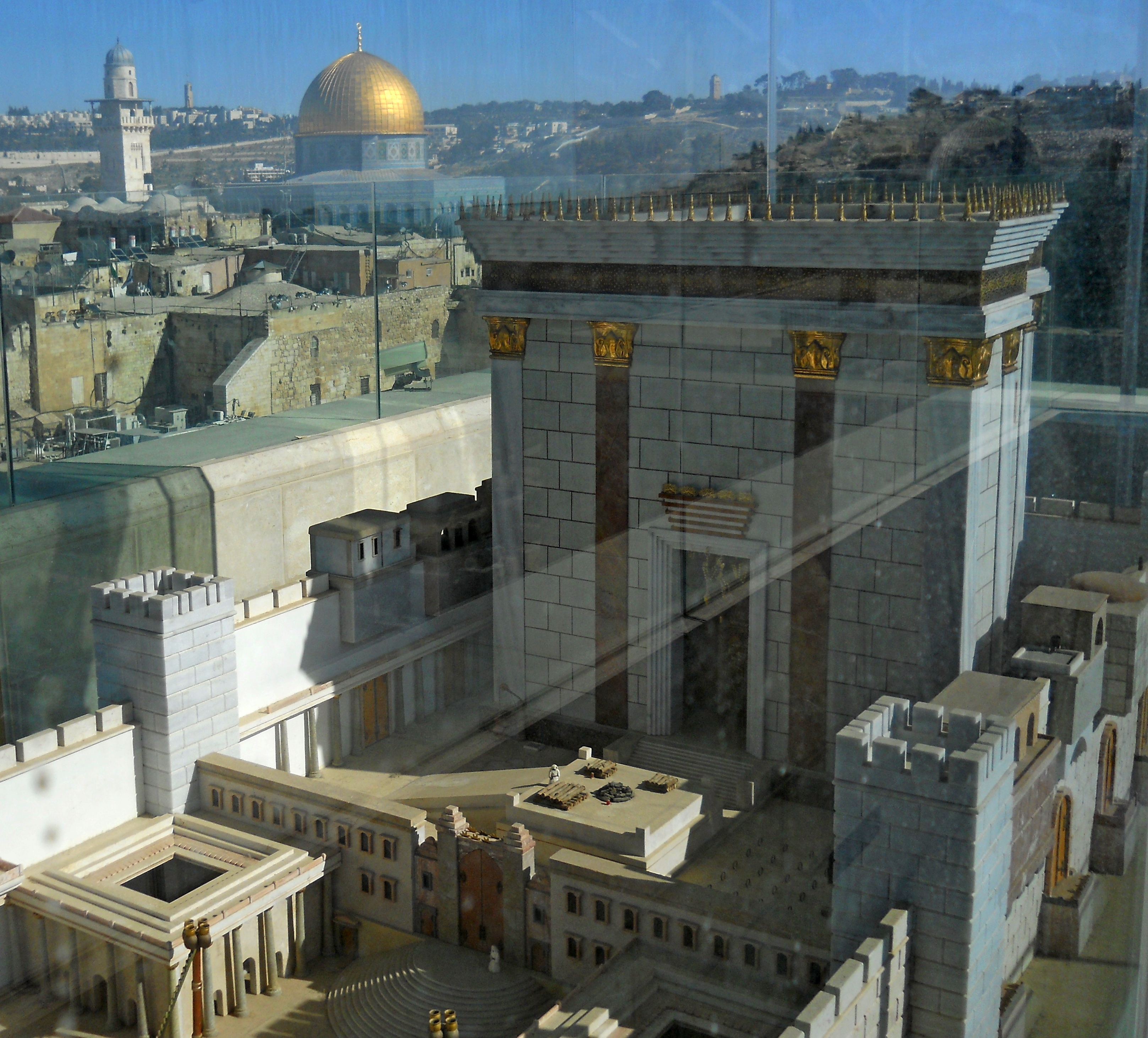 הר הבית הוא מתחם מוגבה ושטוח בן כ־140 דונם במזרח העיר העתיקה בירושלים, שהינו הרחבה מלאכותית מתקופת הורדוס (בן המאה הראשונה לפני הספירה), של הר המוריה הקדום.